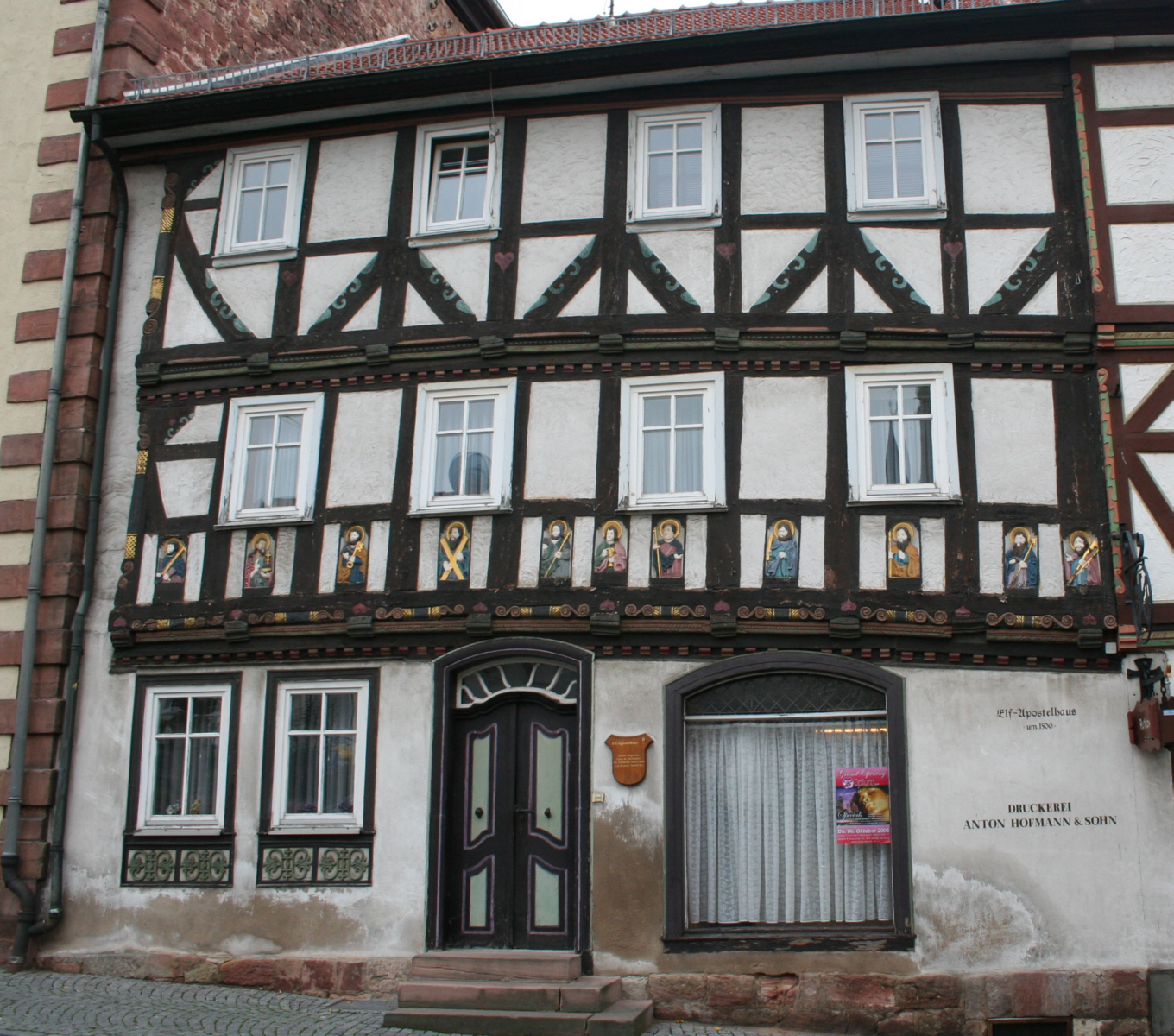 Das "Elf-Apostel-Haus" in der Stadt Tann (Rhön)